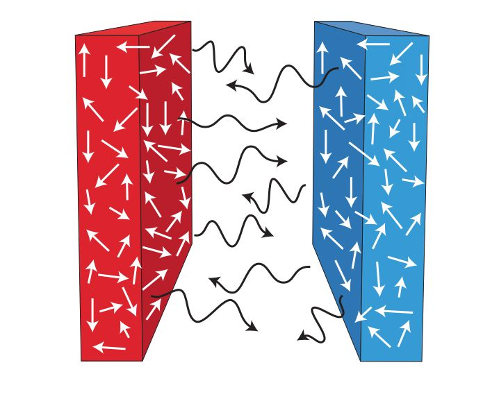 El efecto Casimir como fuerzas de Van der Waals, resultante de fluctuaciones de carga en las placas conductoras (flechas blancas). Las flechas negras representan fotones portadores de fuerza electromagnética. Basada en Rodriguez et.al. (2011).